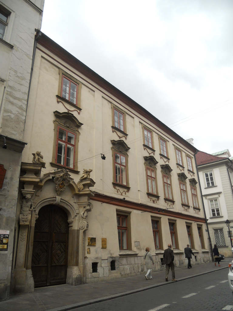 Pałac Popielów przy ulicy św. Jana 20 w Krakowie.